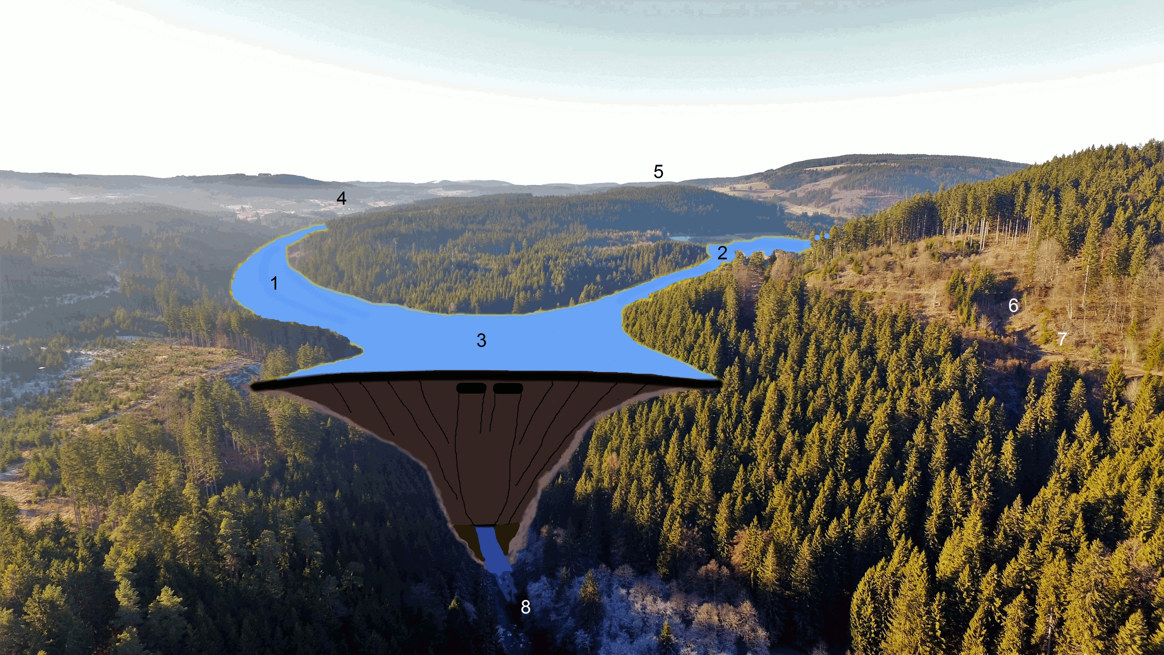 Ausdehnung des geplanten Haslach–Gutach-Stausees bei Vollstau, mit der Wutachstaumauer unterhalb der Haslachmündung (3); zudem gekennzeichnet: Haslachtal (1), Gutachtal (2), Lenzkirch–Ruhbühl (4), Lenzkirch–Kappel (5), Hörnletunnel (6) der östlichen Höllentalbahn (7), Wutachtal (8).